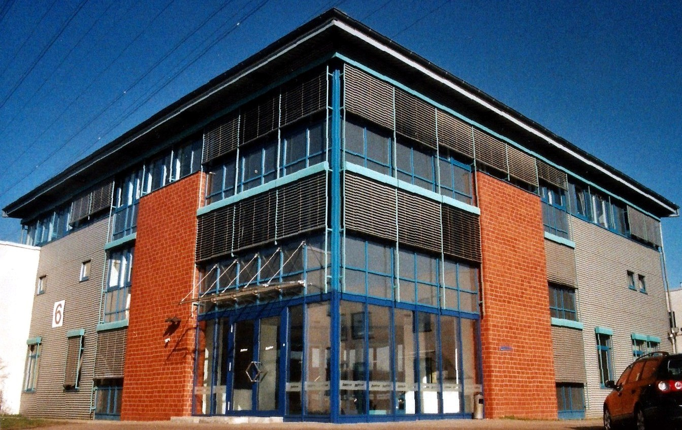 Firmengebäude der DeWind Europe GmbH in der Seelandstraße 1, Lübeck. Ehemaliges Gebäude der Flender Werft